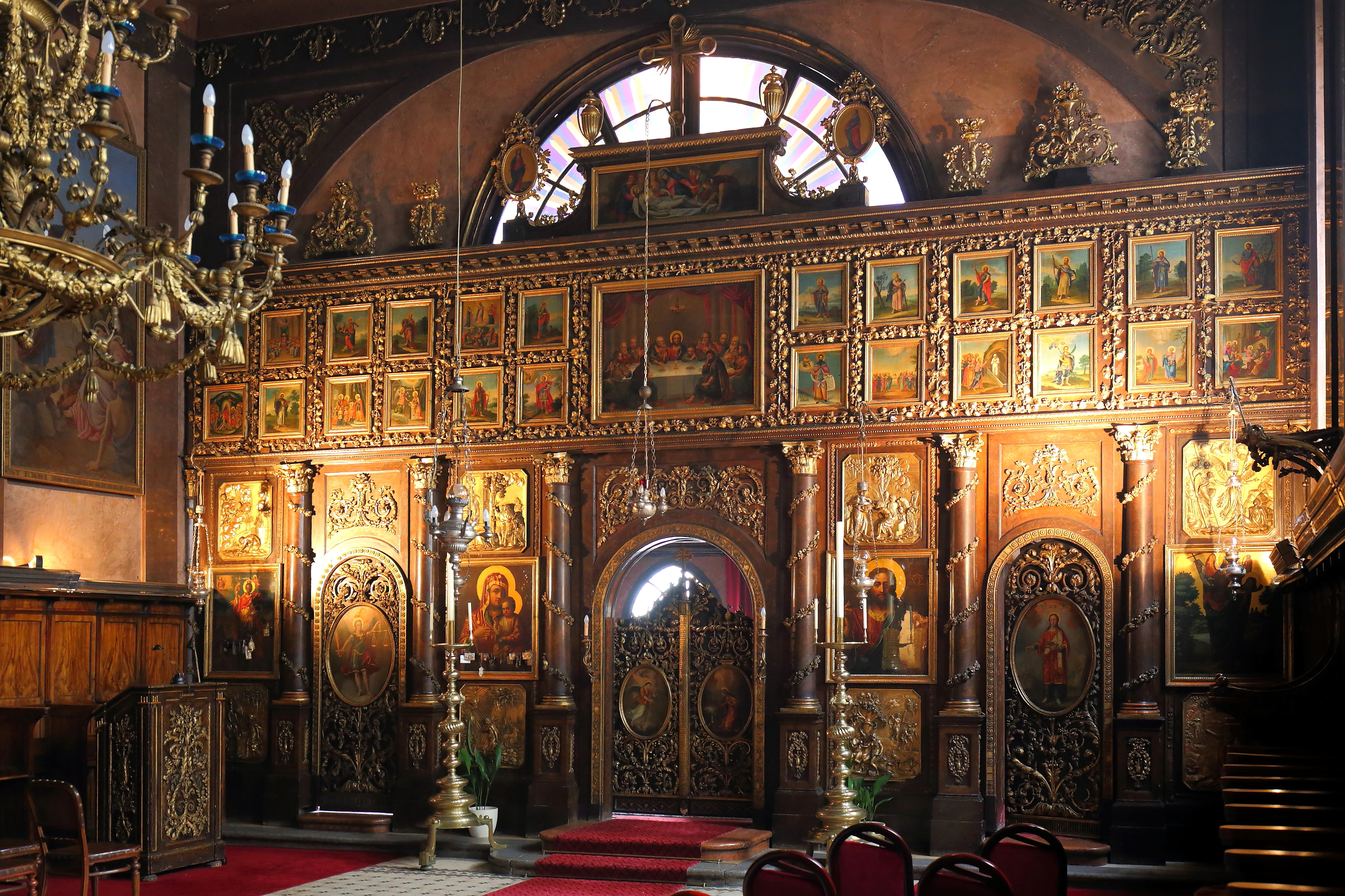 Innenansicht der griechisch-orthodoxen Georgskirche im 1. Wiener Gemeindebezirk Innere Stadt. Die Kirche wurde Anfang des 19. Jahrhunderts nach Plänen des Architekten Franz Wipplinger gebaut. Ein Umbau und die Errichtung des Glockenturmes erfolgte Ende des 19. Jahrhunderts.